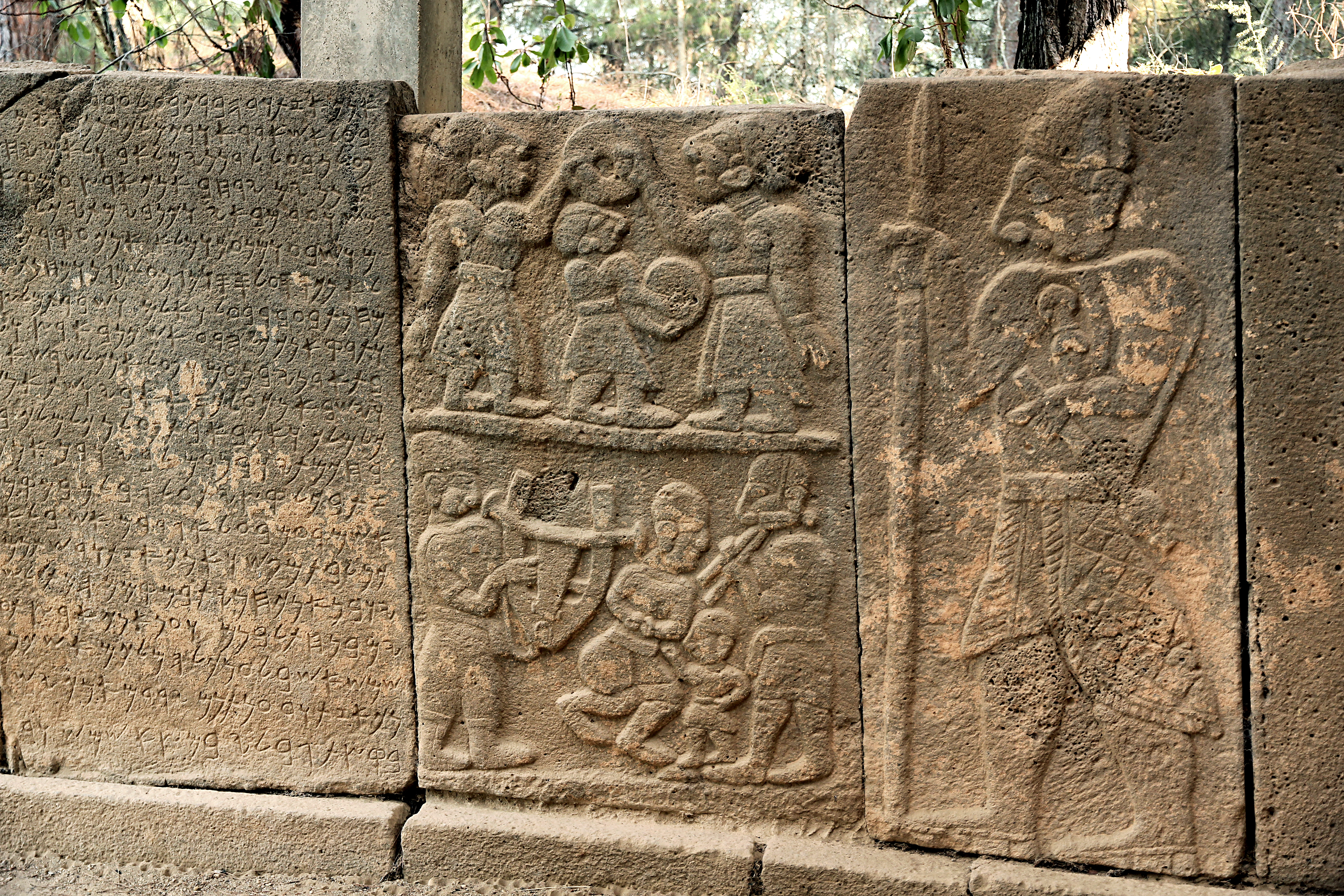 Karatepe (Asatiwataya), neo-hethitischer Fundort bei Osmaniye, Südtürkei, Nordtor, Reliefs NVl 6-8